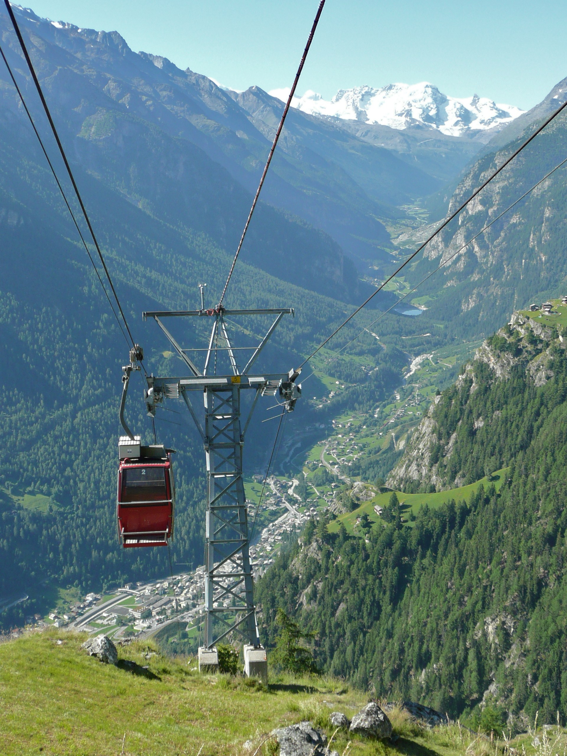 Seilbahn auf Jungen. Blick von oberhalb Gafinu auf St. Niklaus und das hintere Mattertal (Blickrichtung ist annähernd Süd). Im Hintergrund der Alpenhauptkamm mit (von links nach rechts) Castor, Pollux, Breithorn und Klein Matterhorn. Die Häusergruppen im Hang rechts im Bild sind Sparren und darunter Teli.